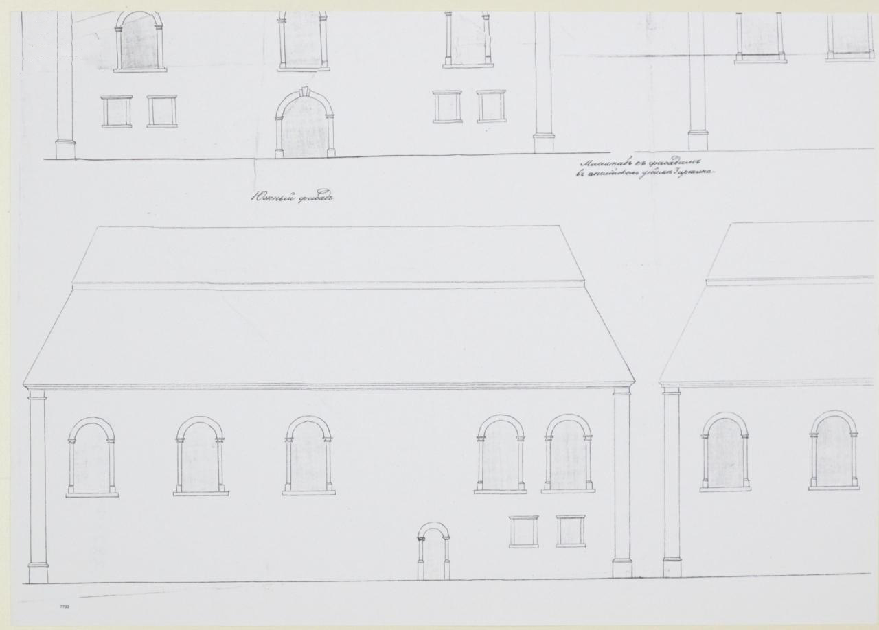 Беларуская (тарашкевіца): Васілішкі (Vasiliški). Сынагога